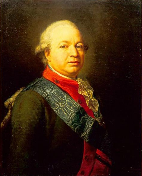 Граф Я́ков Алекса́ндрович Брюс (1732 — 1791), генерал-аншеф, сенатор, Петербургский градоначальник, Московский градоначальник.